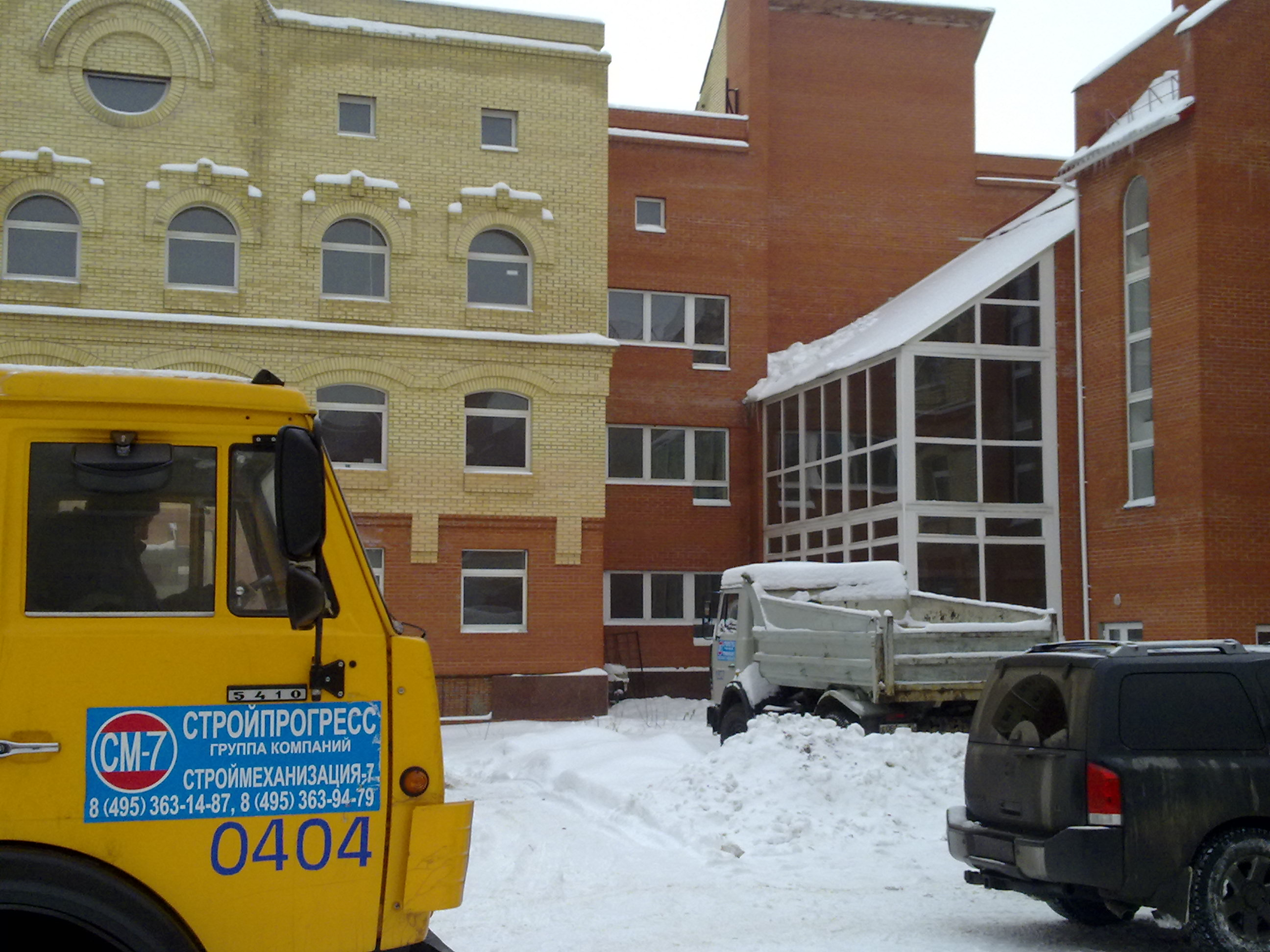 Тамбовская область, Первомайский район, учебный центр «Мострансгаз»